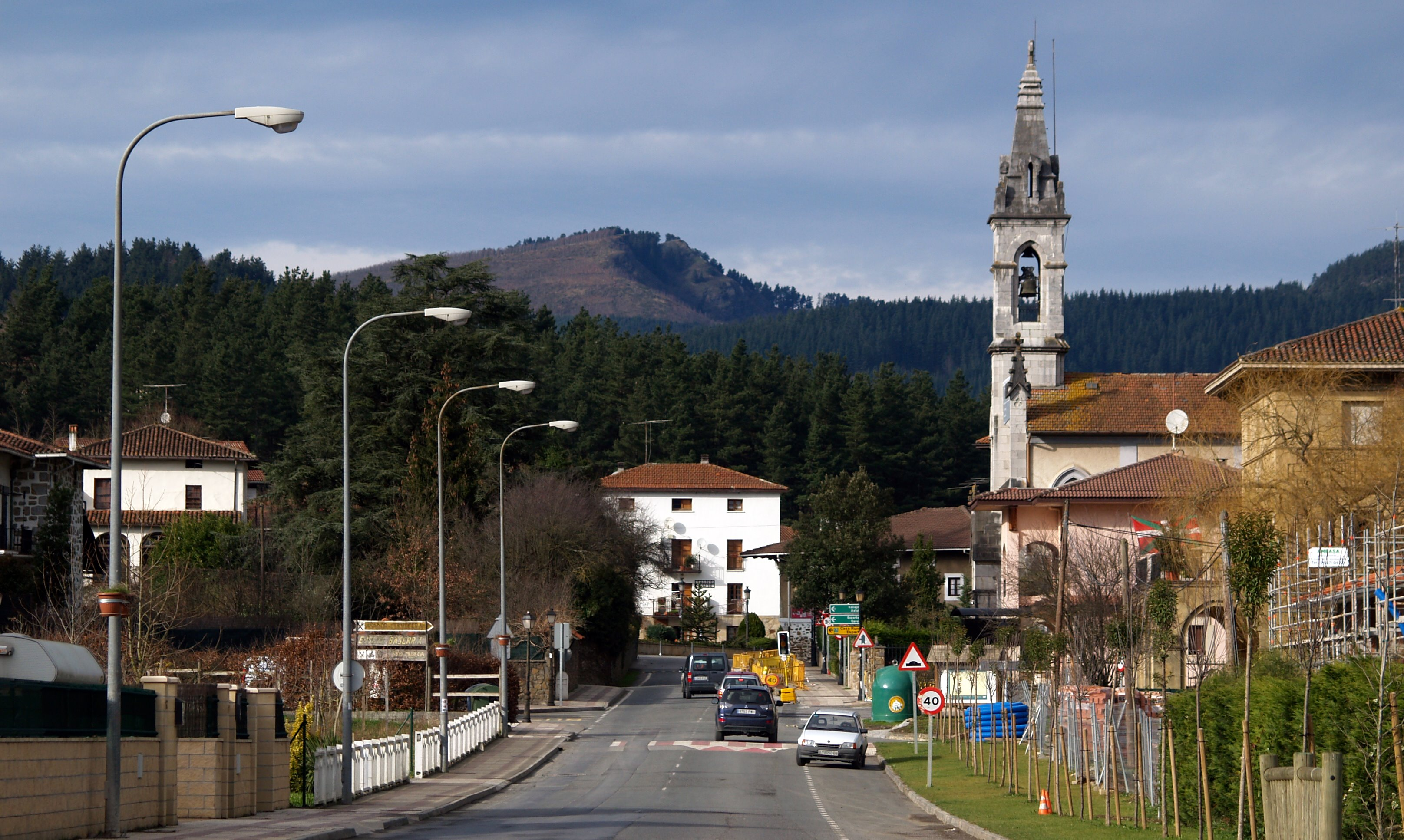 Volviendo de una excursión al Gorbea